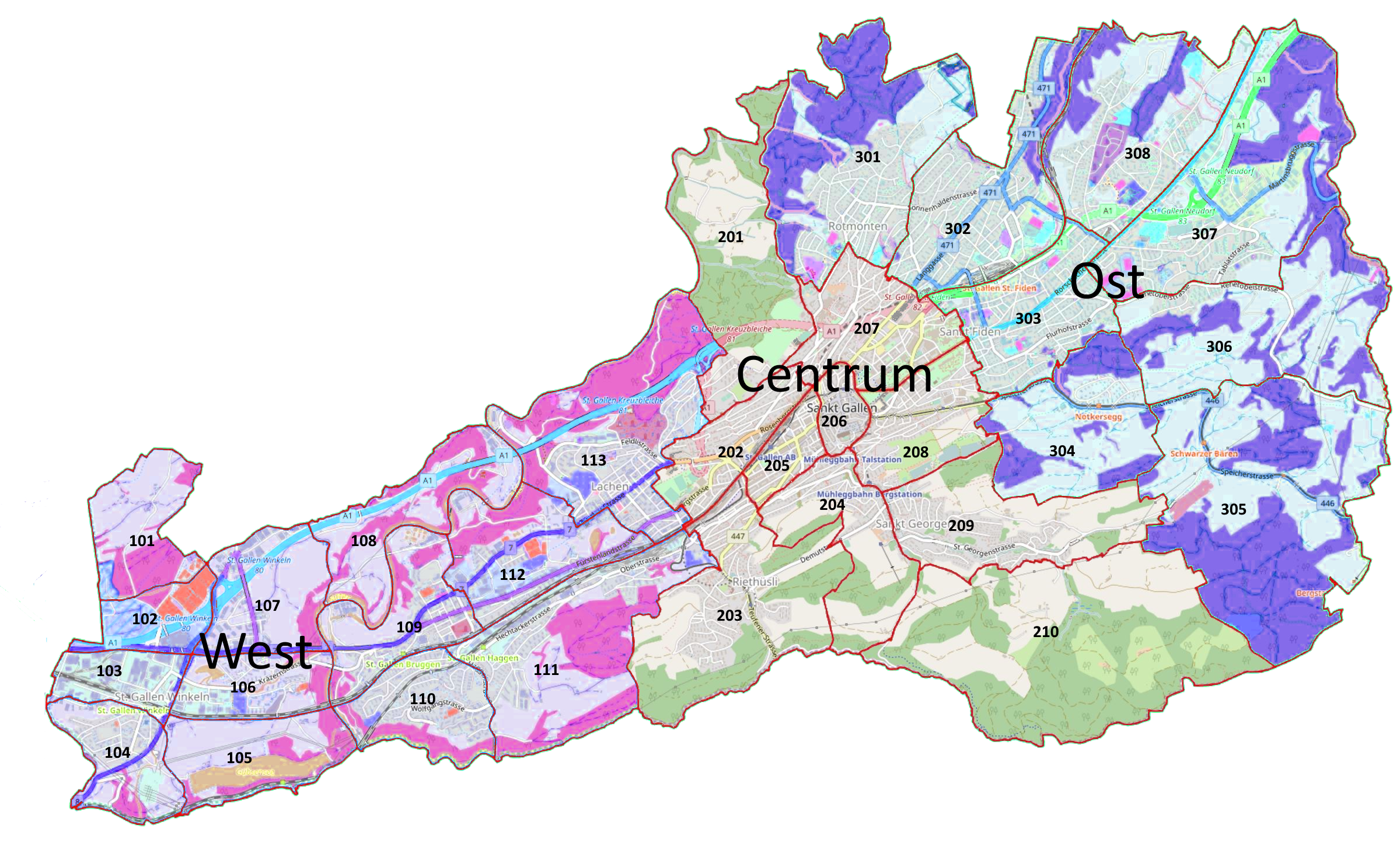 Karte der Stadt St. Gallen mit Grenzen der statistischen Quartiere, Nummerierung von diesen und farblich abgesetzten Stadtkreisen.